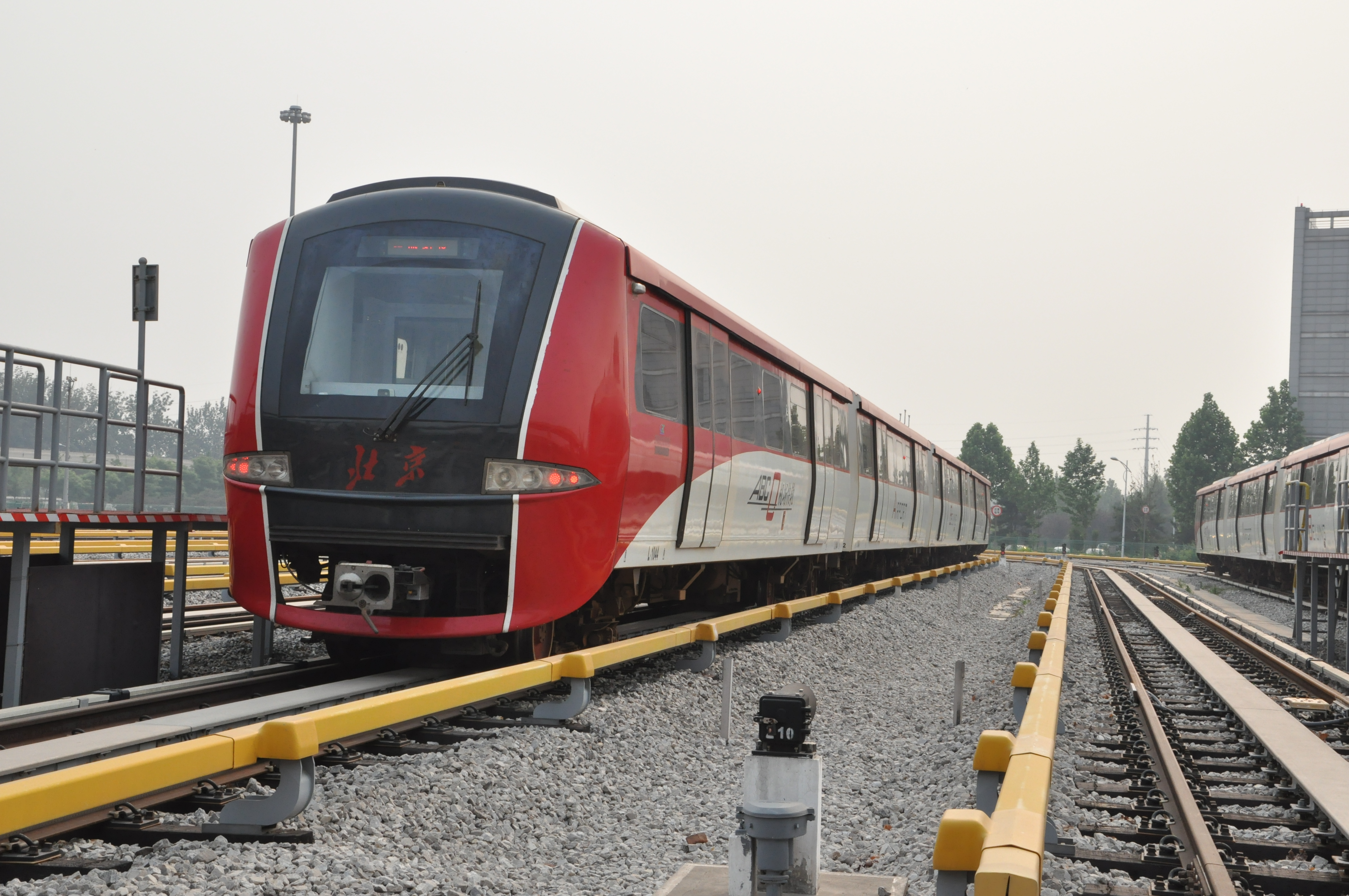 北京机场线车辆，摄于天竺车辆段内